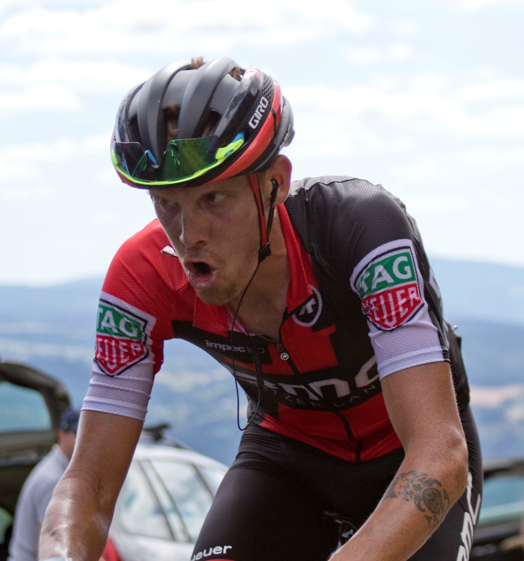 16-7_2 de marchi